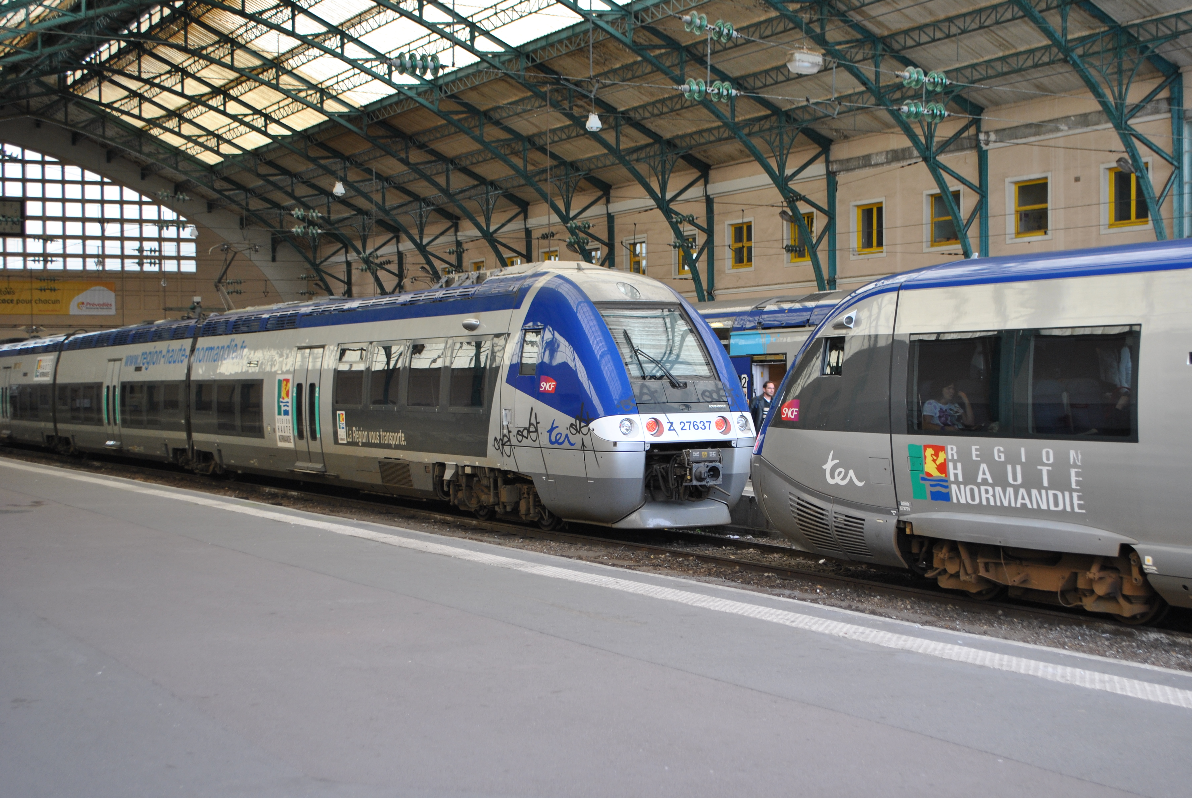 Automotrice Grande Capacité (ZGC) Z 27637 et un autorail X73500 en gare du Havre.